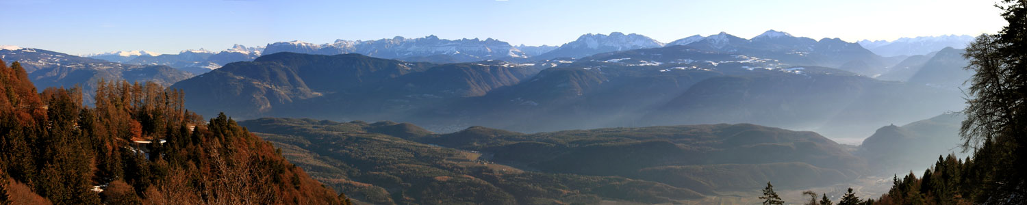 Panorama dal Passo della Mendola (Trentino Alto Adige) verso Nord-Est una mattina di inizio inverno